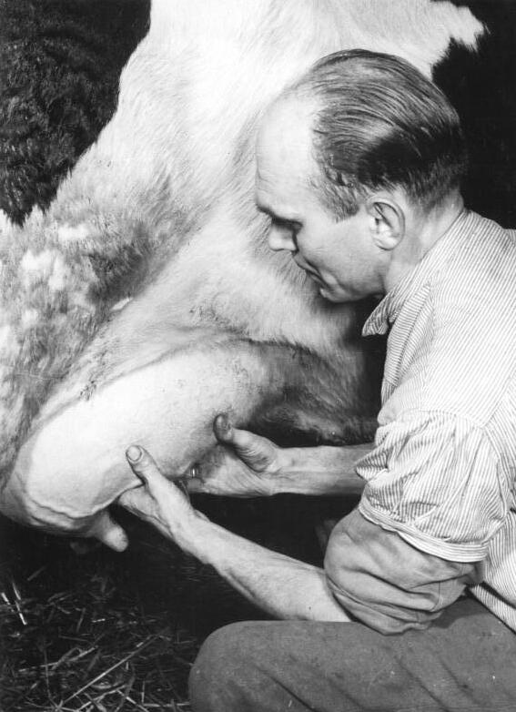 Alt-Geißen, Bauer bei Euteruntersuchung Zentralbild Schutt 3Motive 18.1.1955 Mehr Milch durch bessere Pflege der Kühe Seitdem die LPG "Florian Geyer" in Alt-Geißen Krs. Luckau, zur genossenschaftlichen Viehhaltung übergegangen ist, haben sich die Milchleistungen der Kühe erheblich gesteigert. UBz:Der Schweizer Helmut Müller masiert das Euter der Kuh "Lotte", die täglich 32, 5 Liter Milch mit einem Fettgehalt von 3, 2% durchschnittlich liefert. Durch Pflege und Fütterung konnte diese Leistung erreicht werden."